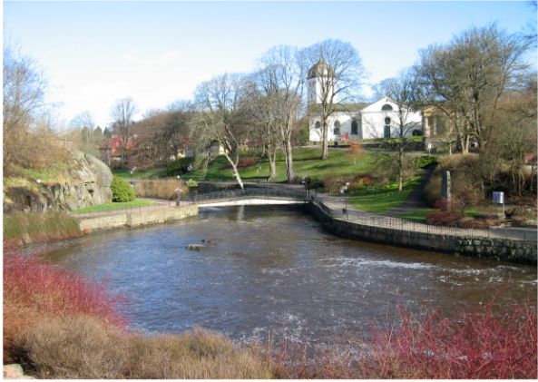 Uddevalla-Bävean